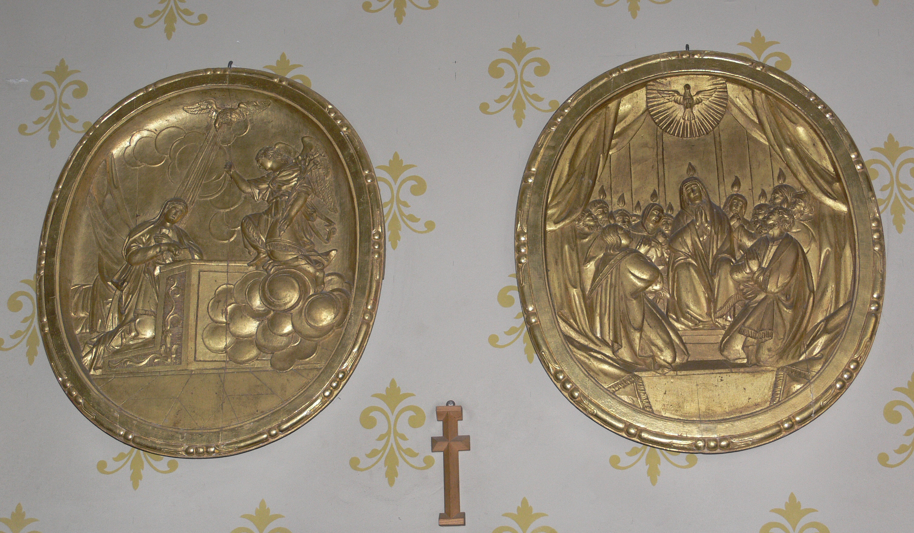 Kath. Pfarrkirche St. Johannes Baptista, Wuchzenhofen, Stadt Leutkirch im Allgäu Medaillons an der Rückwand, Verkündigungsszene und Pfingstwunder